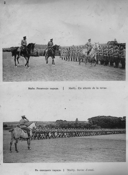 Русский экспедиционный корпус. Фотоальбом. Описание - на фотографии